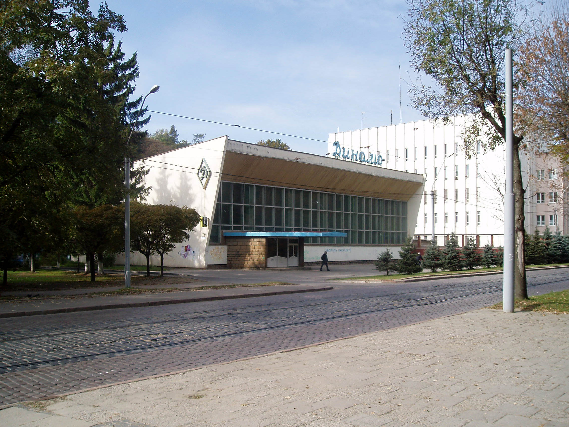 Будинок № 53 на вул. Вітовського. Архітектор Мирон Вендзилович.